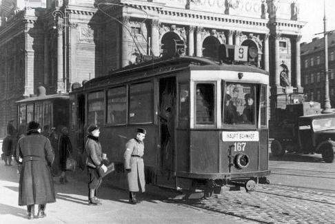 Трамвай маршруту №9. Зупинка біля Оперного театру